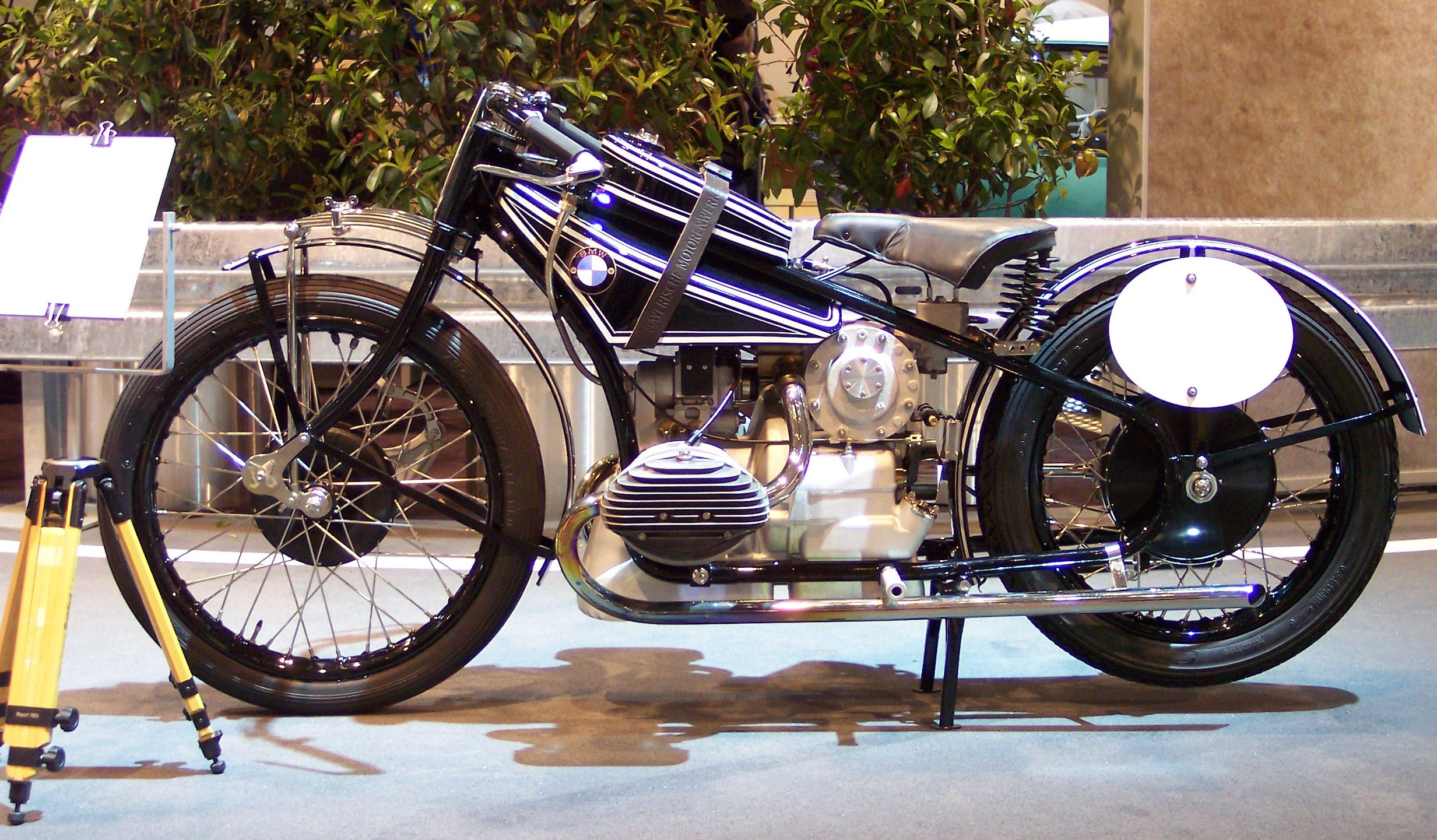 BMW WR 750 1929